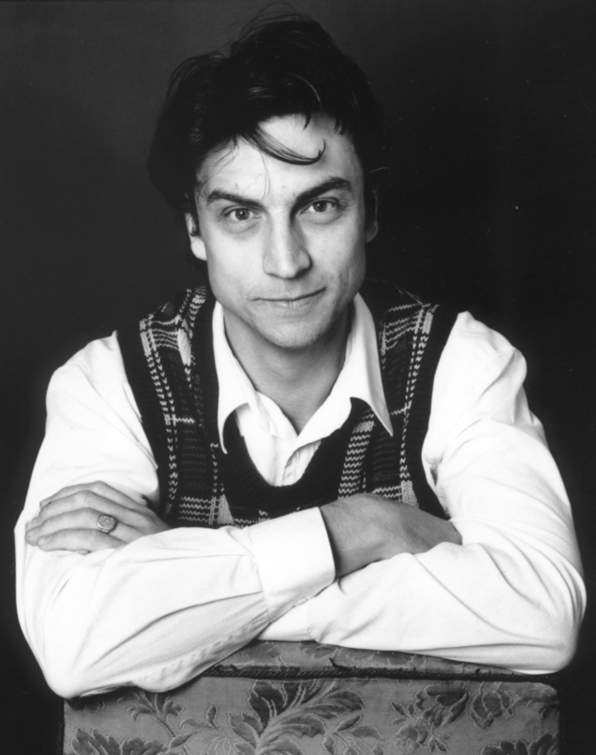 Jockum Nordström